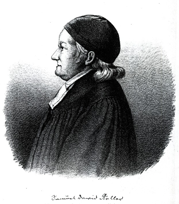 Porträt des Pastors Roller aus Lausa bei Dresden.